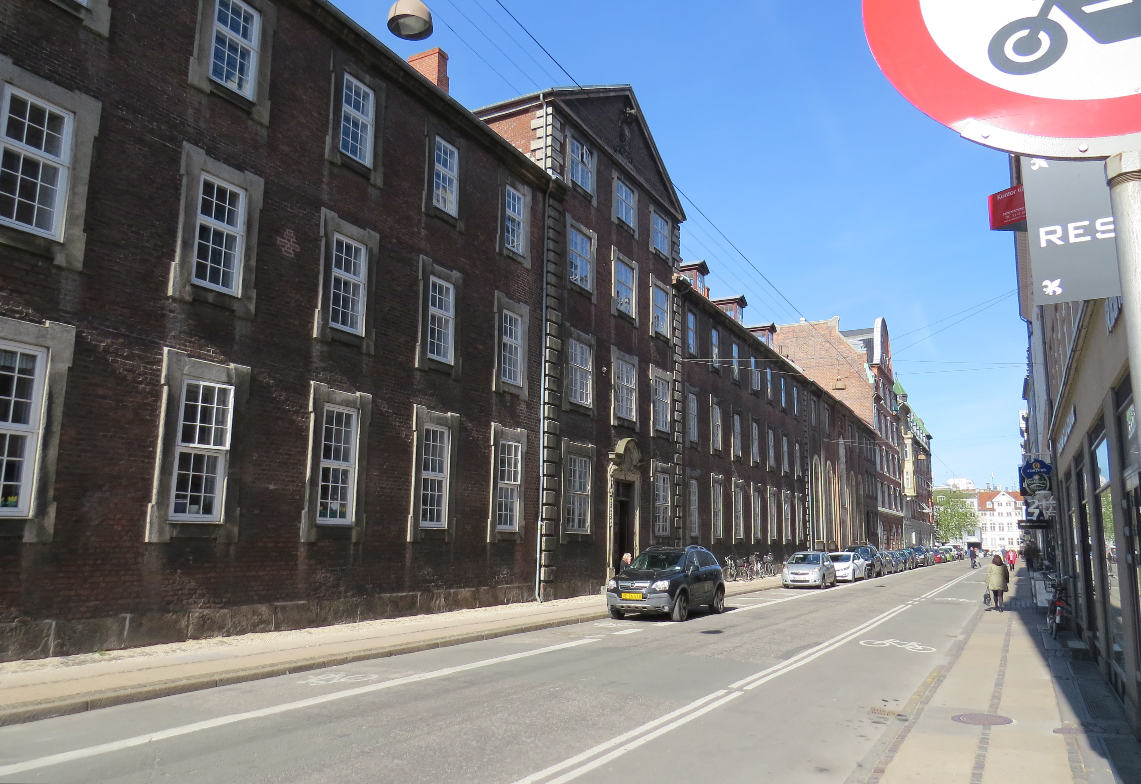 Løngangstræde med Vartov og Vartov Kirke til venstre, København